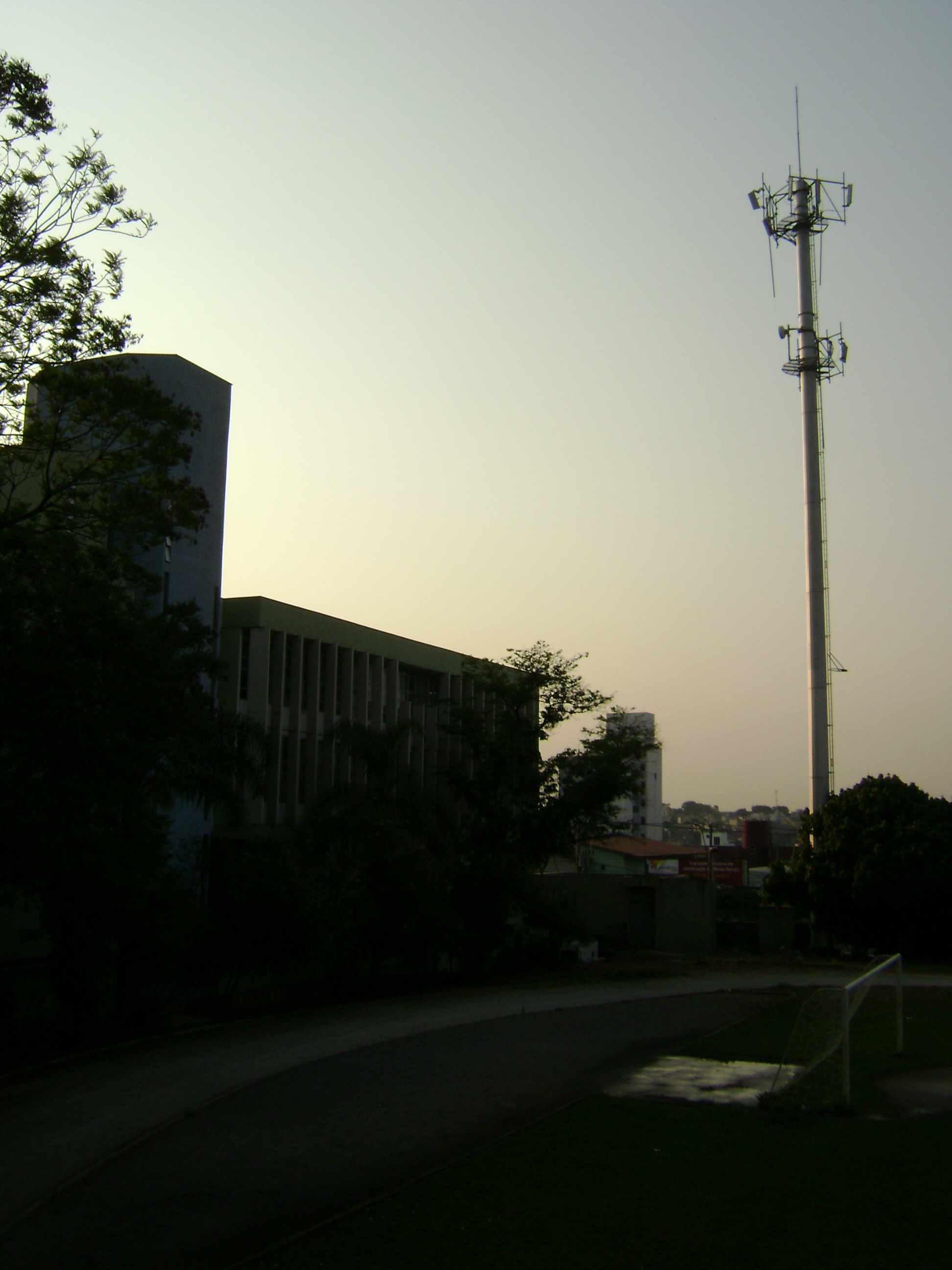 Antiga antena de rádio (que não existe mais) no campus I do Cefet-MG, em Belo Horizonte.